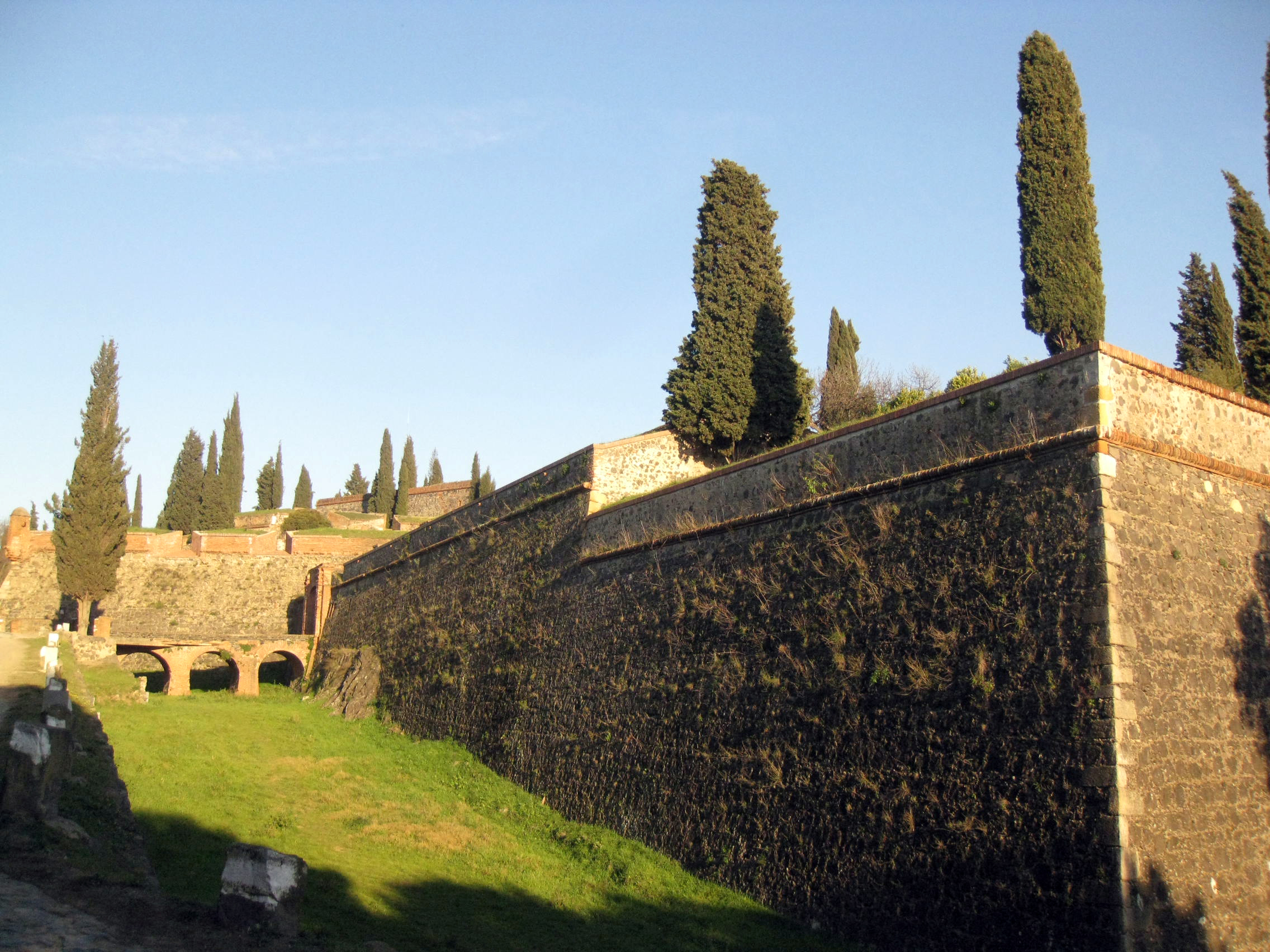 Muralla i castell (Hostalric) Object location41° 44′ 38.43″ N, 2° 38′ 01.42″ E